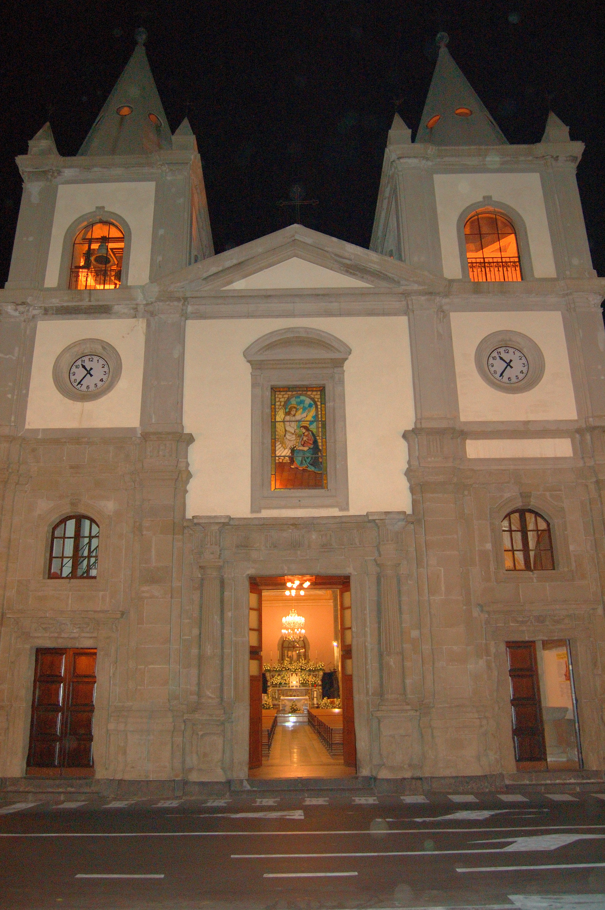 La foto rappresenta la chiesa dell'Annunziata, in notturna, di Francavilla di Sicilia